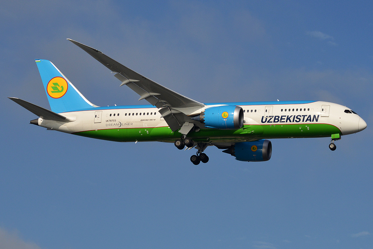 Uzbekistan Airways, UK78703, Boeing 787-8 Dreamliner